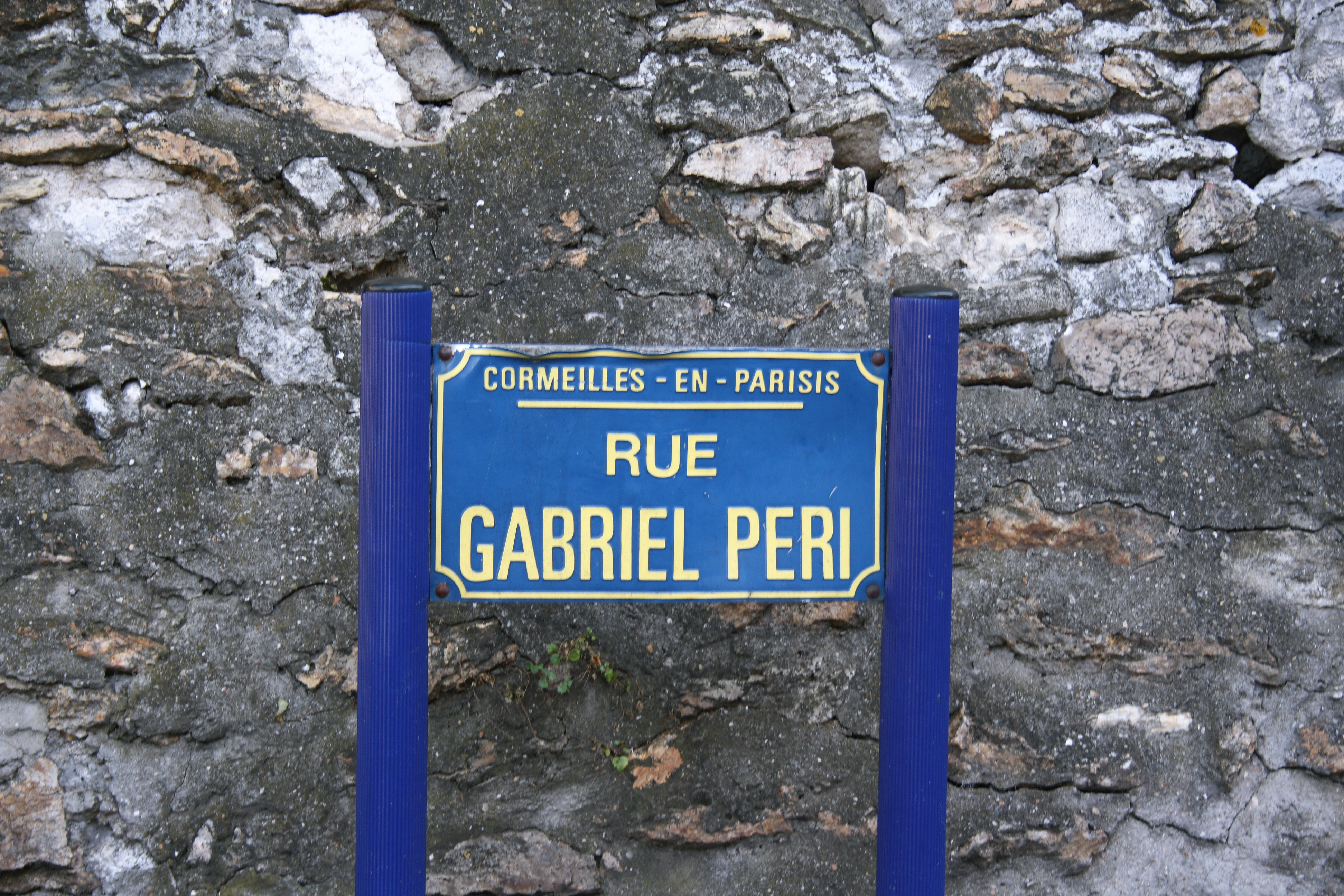 Straßenschild in Cormeilles-en-Parisis im Département Val-d’Oise (Île-de-France)